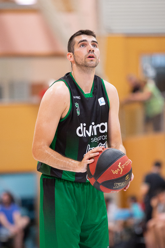 Dakota Mathias, jugador del Club Joventut de Badalona, en un partir de pretemporada a Sant Julià de Vilatorta